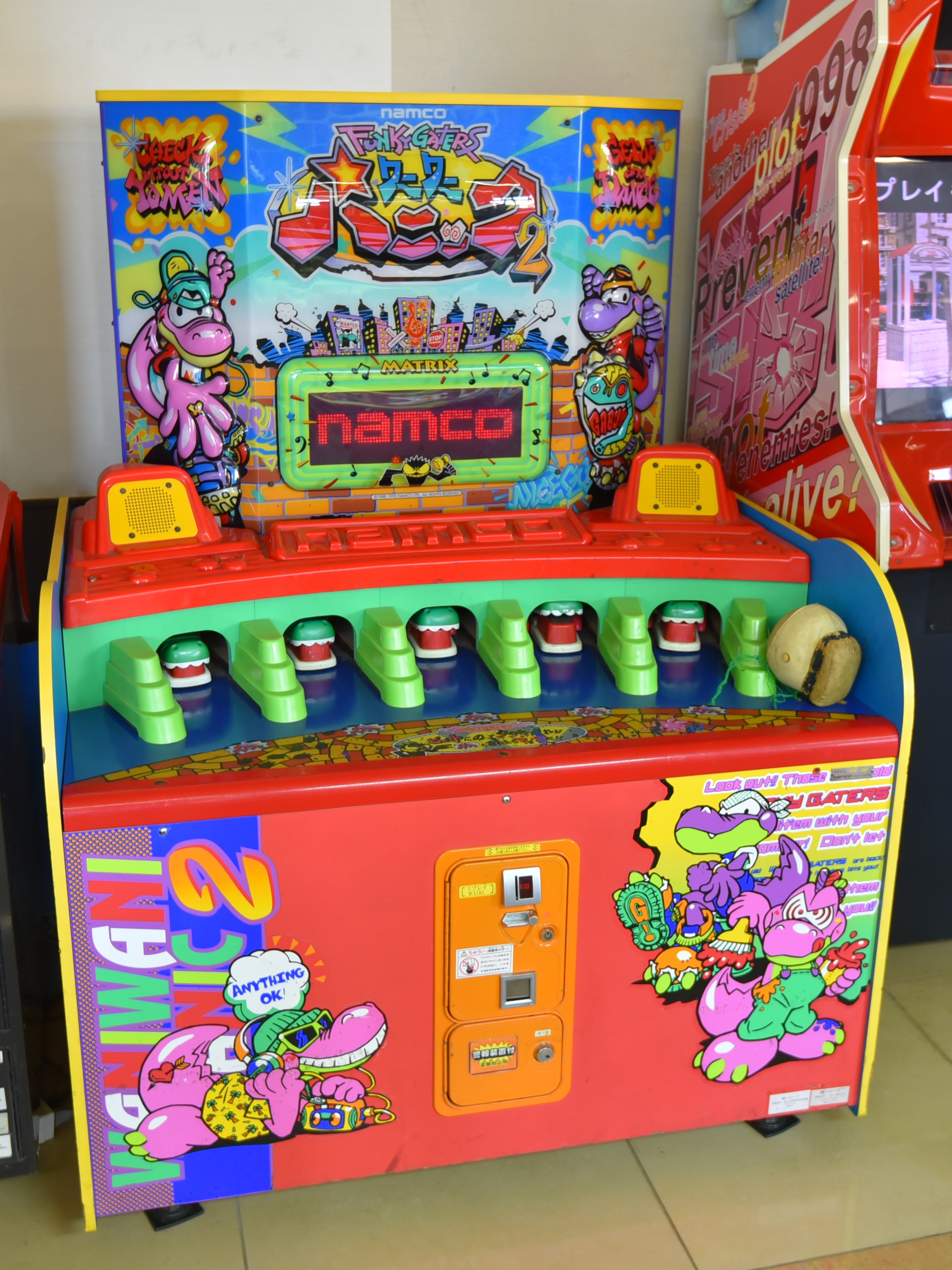 『ワニワニパニック』（ナムコ）のアーケードゲーム筐体